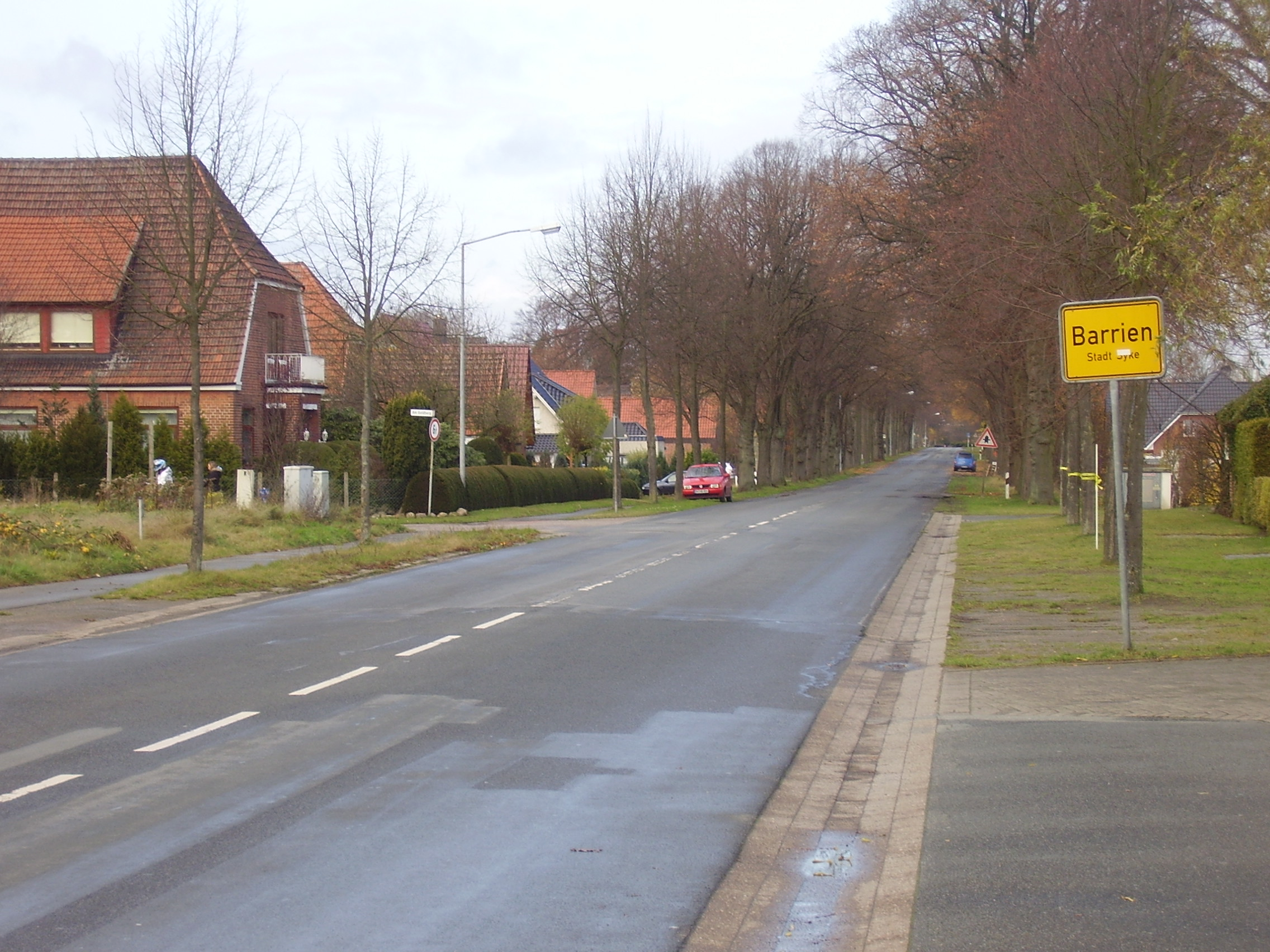 Syke; ortsteil Barrien, Niedersachsen; fotografiert: November 2008